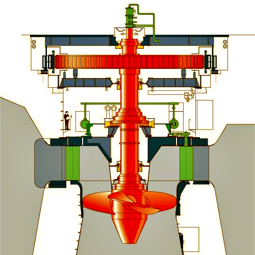 Kaplan-Turbin vert. Schema